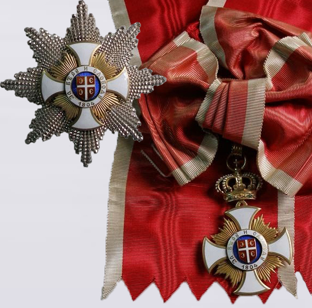 Орден Карађорђеве Звезде 1. степена